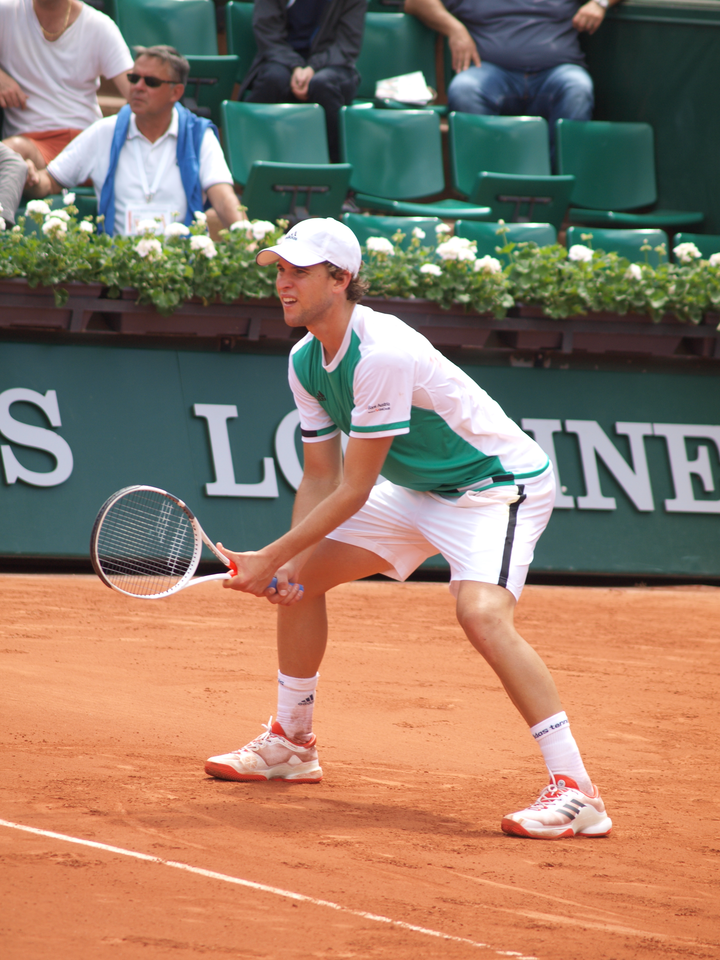 Dominic Thiem, aux Internationaux de France de Paris (Stade de Roland Garros) , le 31 mai 2017, dans son match contre Simone Bolelli